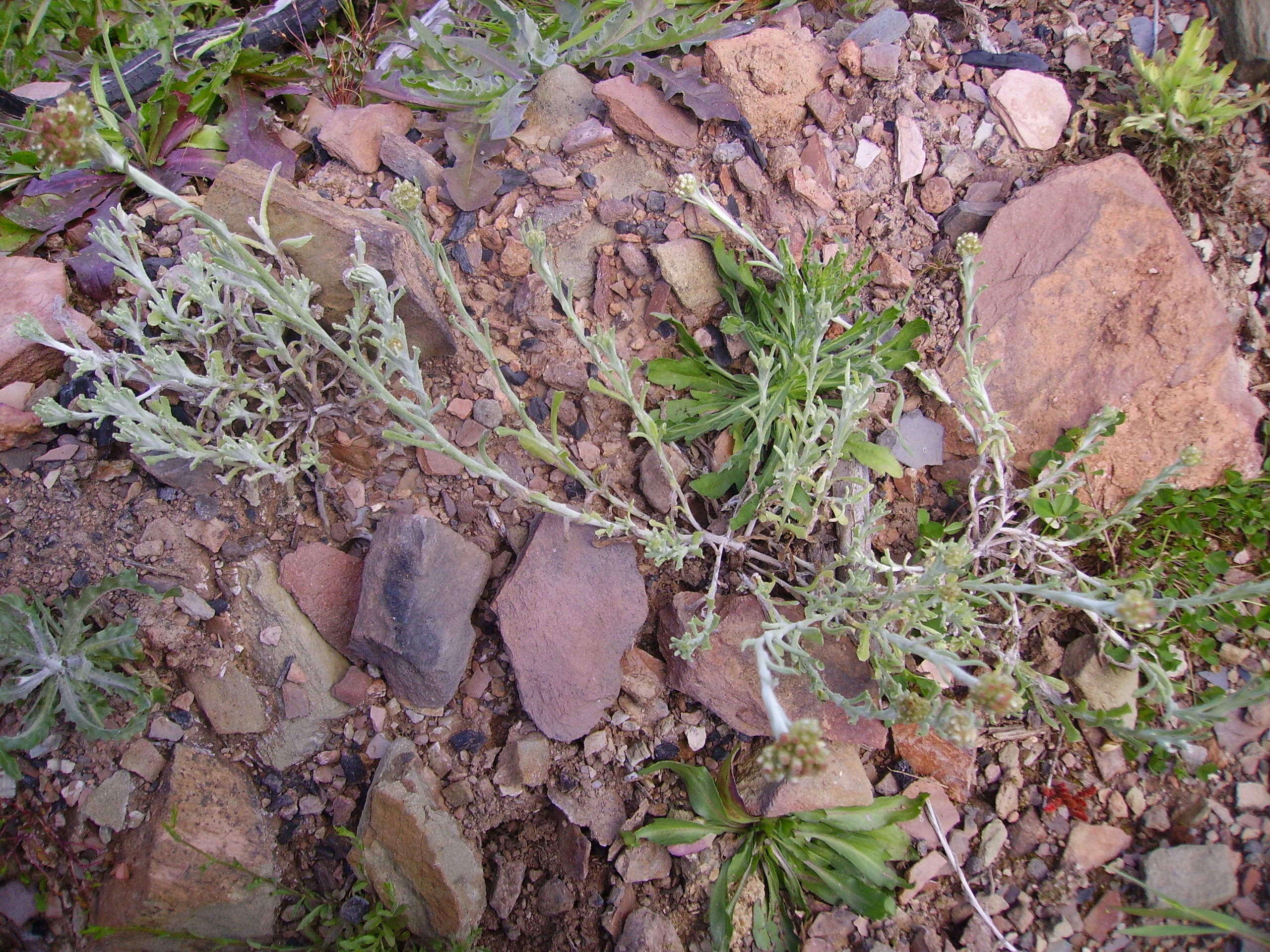 Foto de Gnaphalium luteo-album (= Pseudognaphalium luteoalbum, Laphangium luteoalbum, Helichrysum luteoalbum), tomada en el Andévalo (Huelva).